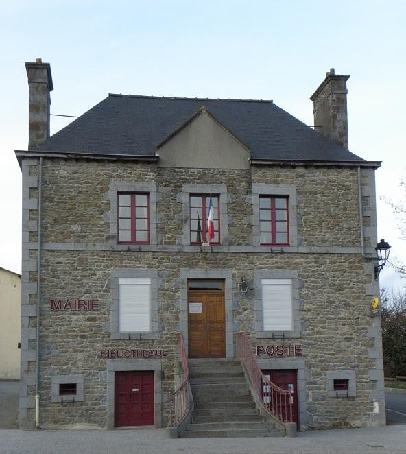 Mairie du Tronchet (35).